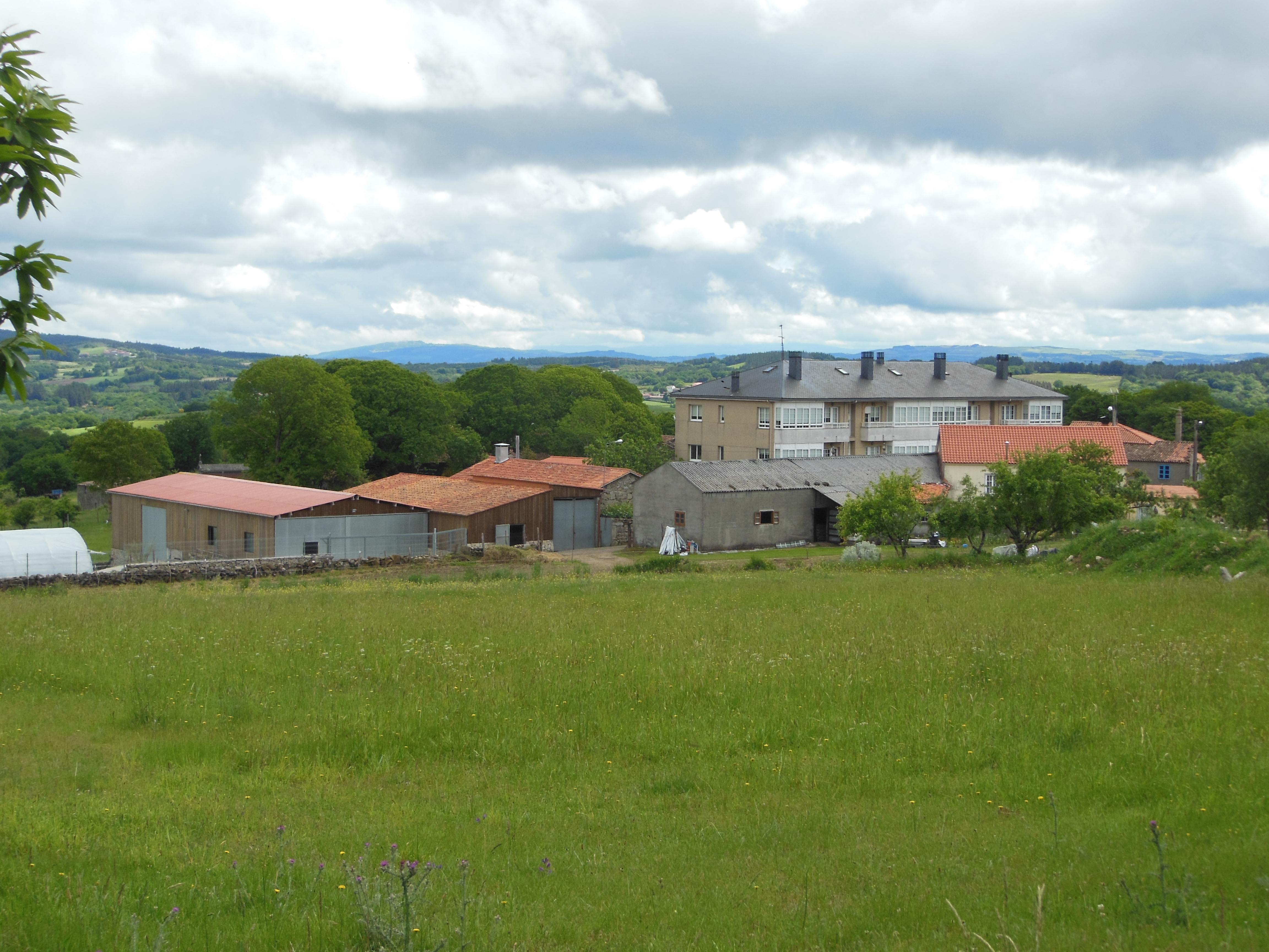 Aldea da Eirexe, en Olveda, Antas de Ulla